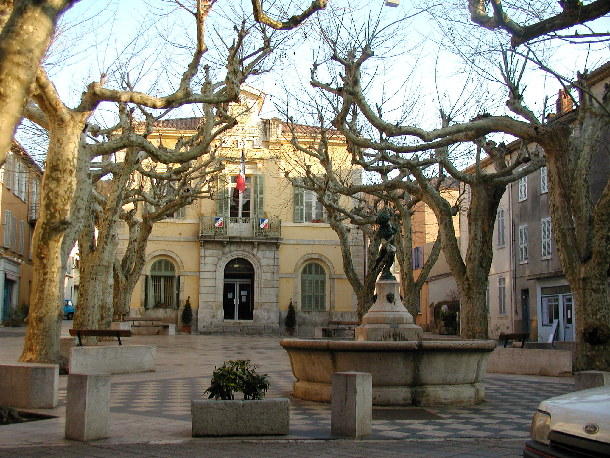 Collobrières (Var, France) - Place de la Libération.